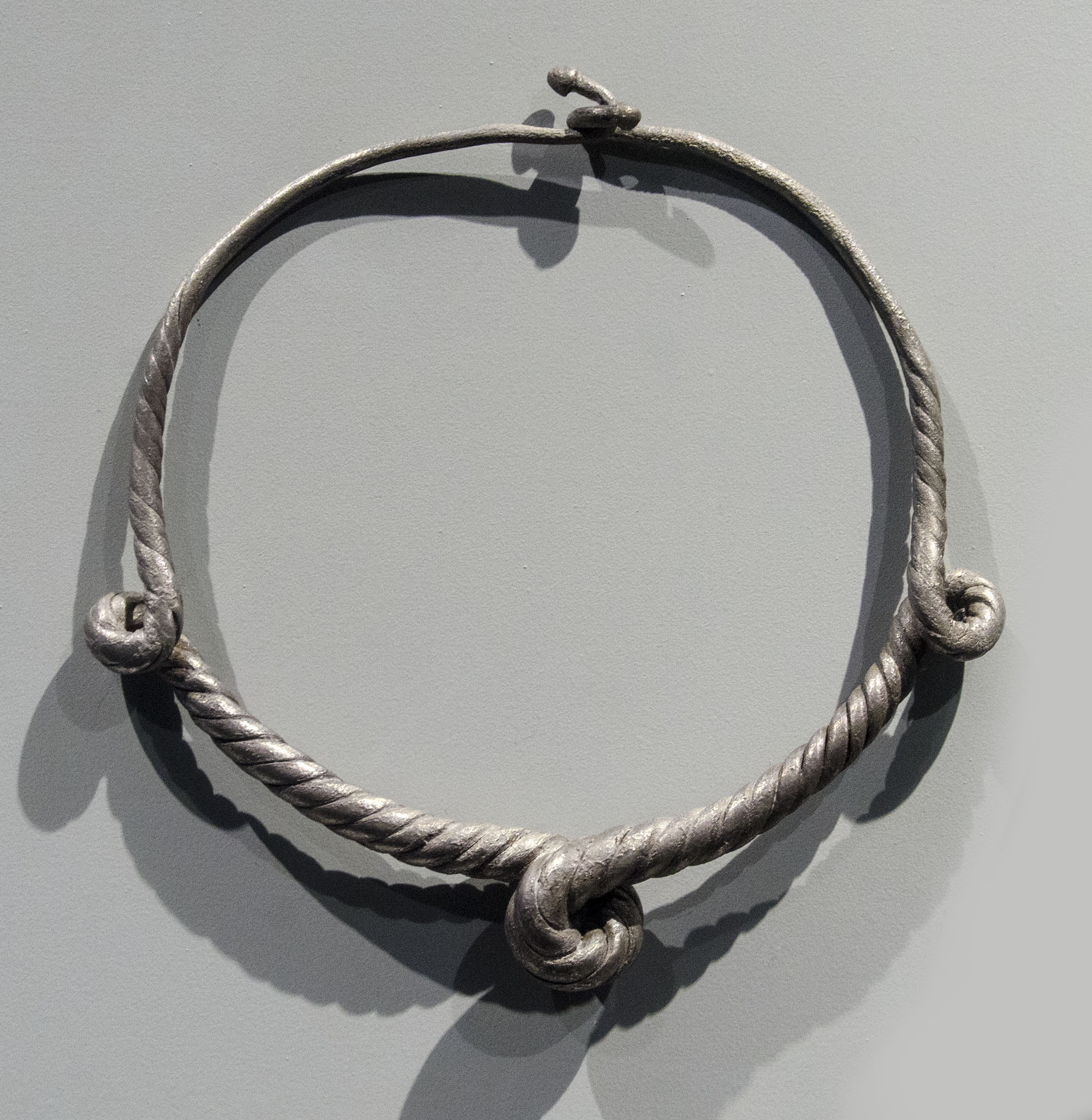 Brazalete encontrado en Palencia en 1956 en el colegio de las Filipenses, formado por joyas de plata y de oro, torques, collares, pulseras, brazaletes, pendientes, fíbulas y denarios de plata.